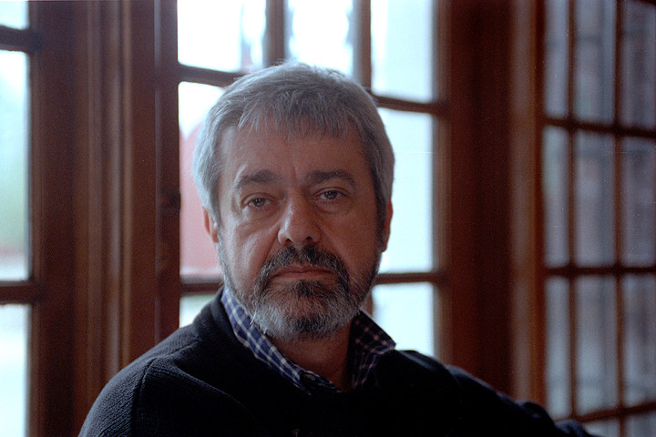 Jurek Becker